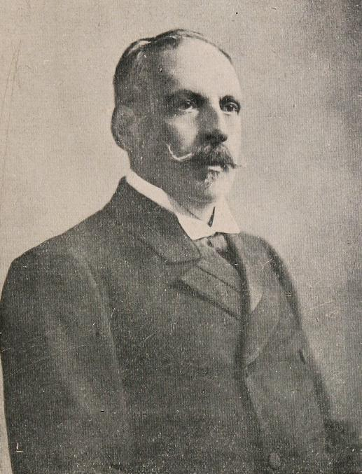 Domingo Hilarión Godoy Cruz (1847-1916) fue un abogado y político chileno.